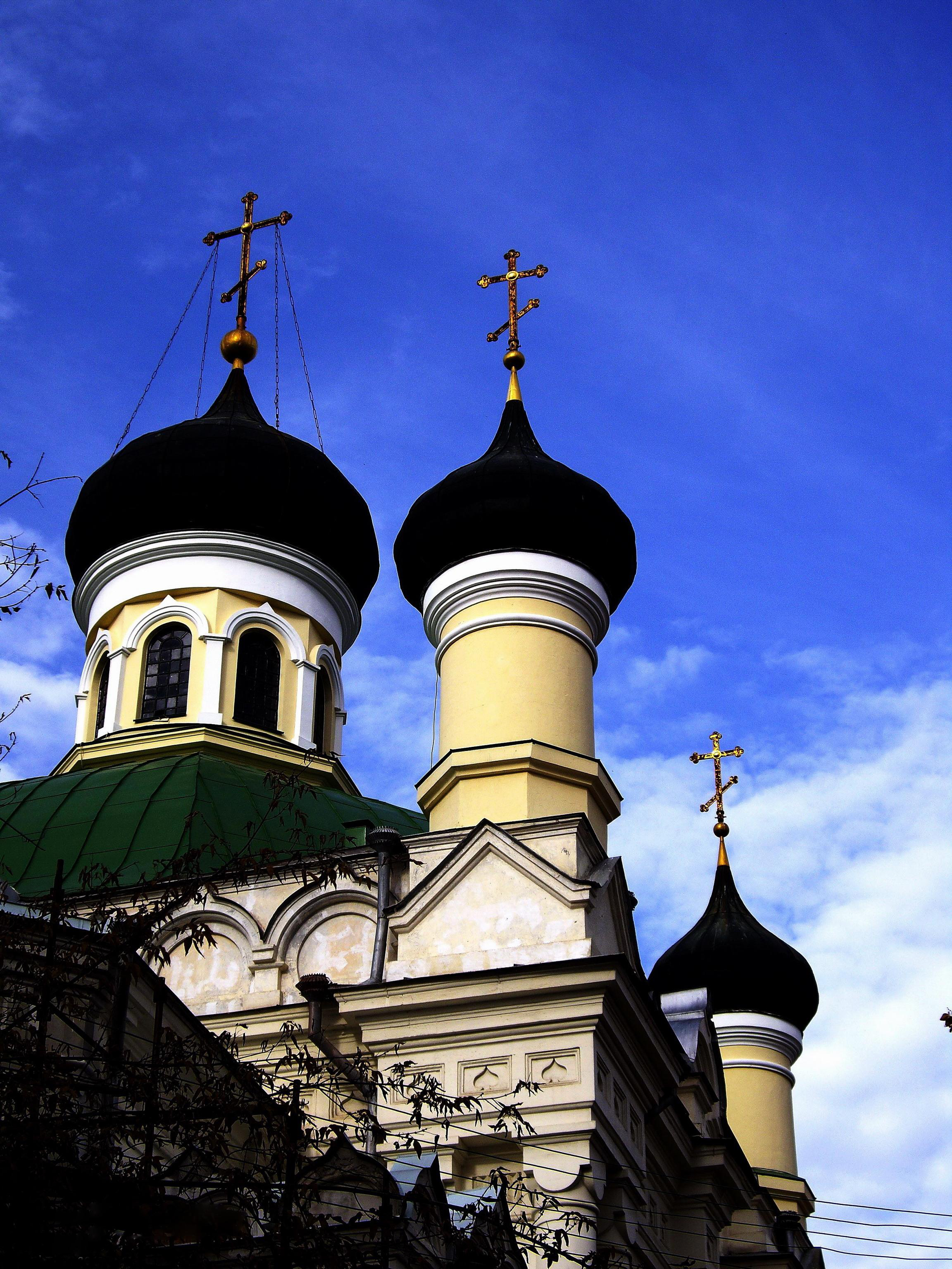 вул. Героїв Аджимушкая, 7 вул. Гоголя, 16 (1903 р., перебудова 30-і роки XX ст.)